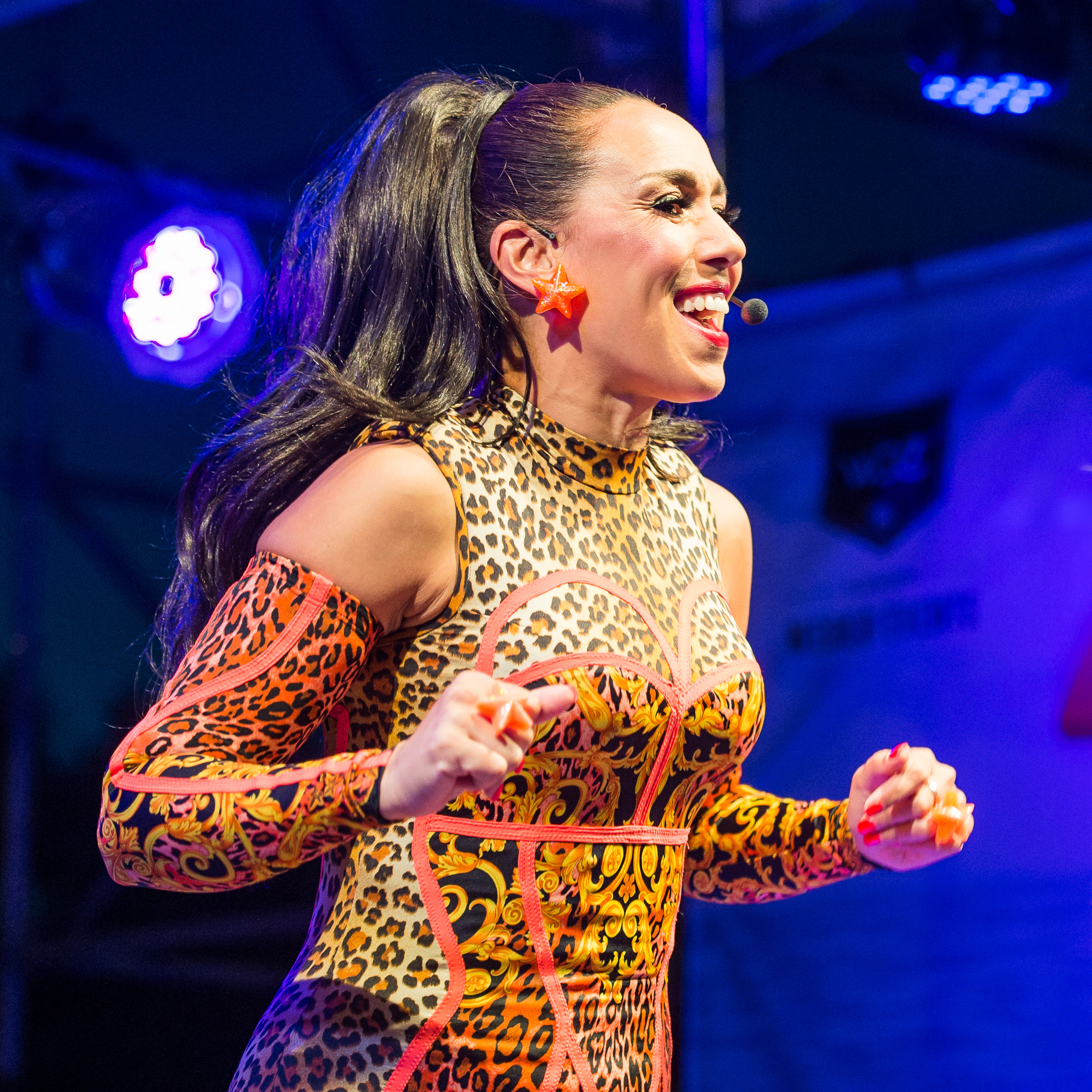 Kim Sasabone,Konzert,Livekonzert,Livemusik,Musik,Radio N1,Super Sommer Sause 2016,Vengaboys,Werk B Events